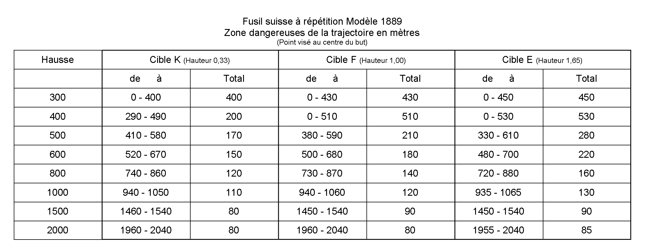 Zones dangereuses du fusil suisse à répétition Modèle 1889